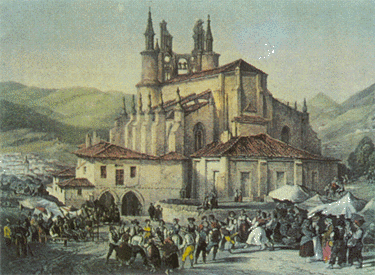 Romeria en Begoña tras la primera guerra carlista.